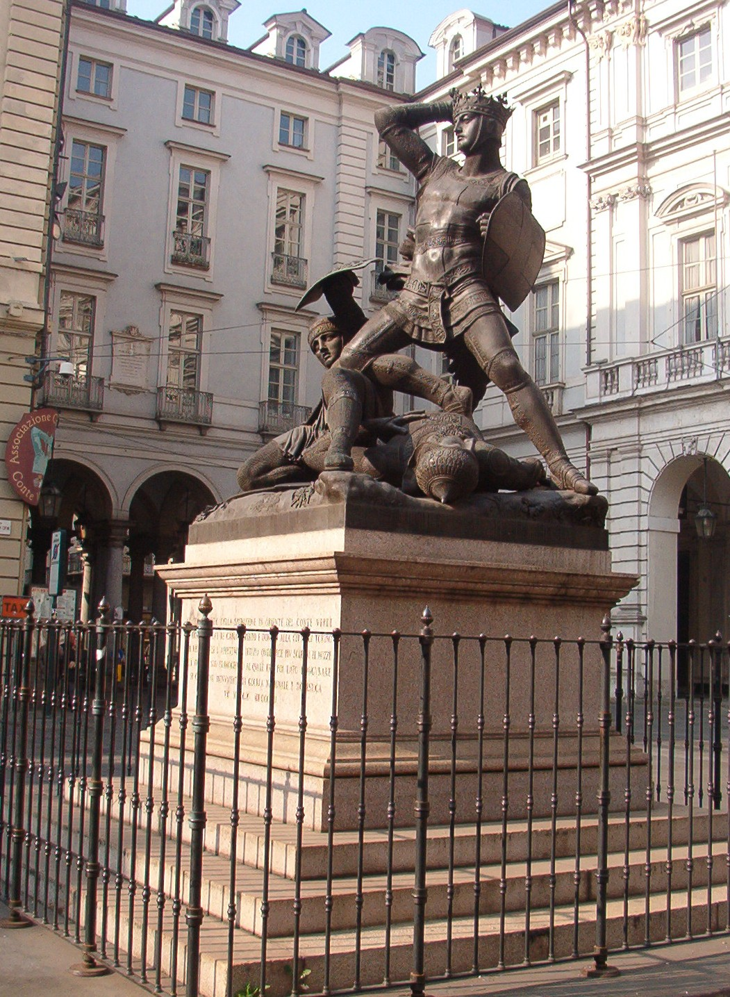 Pelagio Palagi, Monumento ad Amedeo VI di Savoia, detto "il Conte Verde", in Piazza Palazzo di Città - Torino - Italia